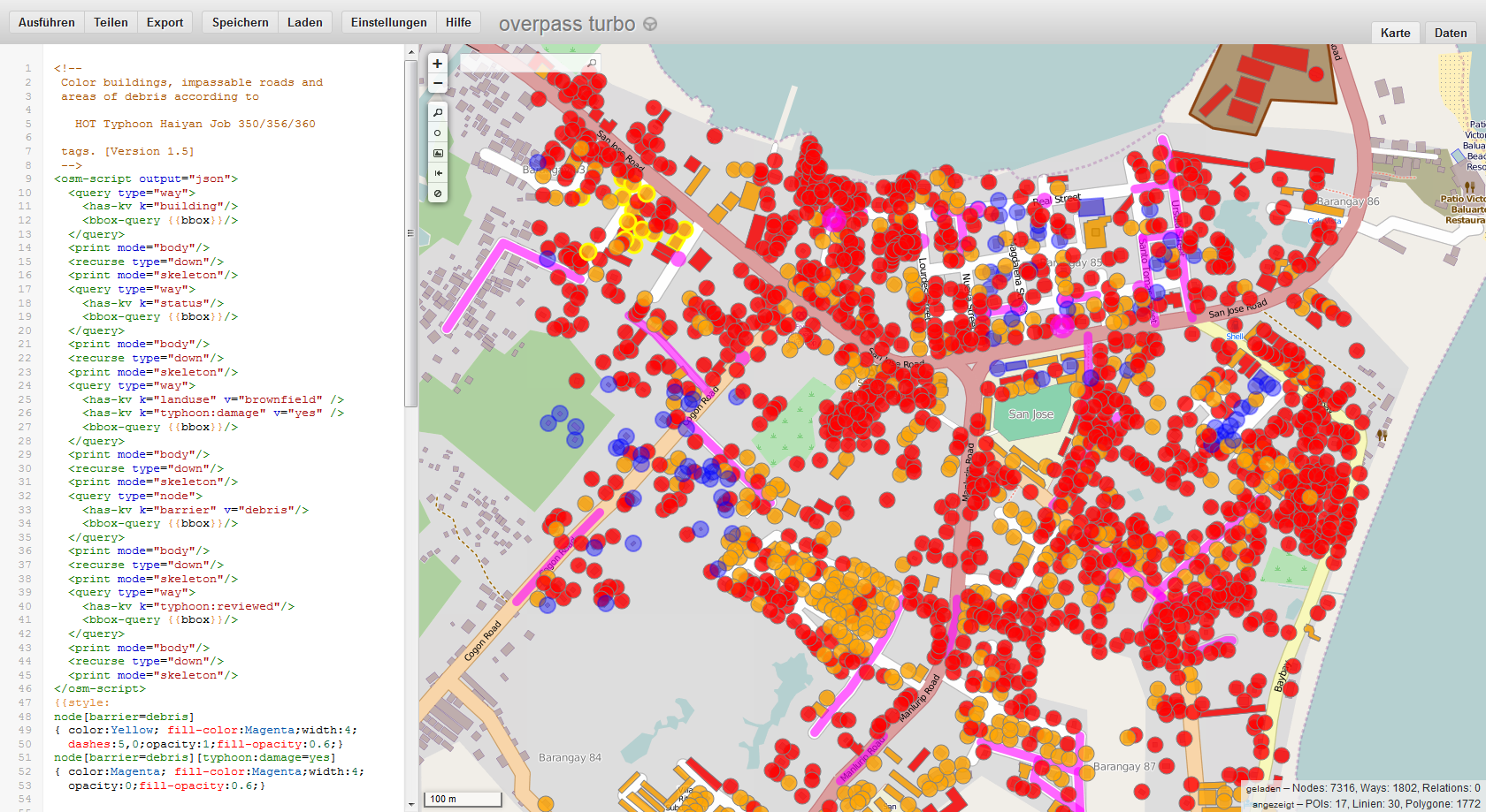 Darstellung der von Taifun Hayan betroffenen Gebäude. Screenshot von OSM Datenmaterial in Overpass-Turbo